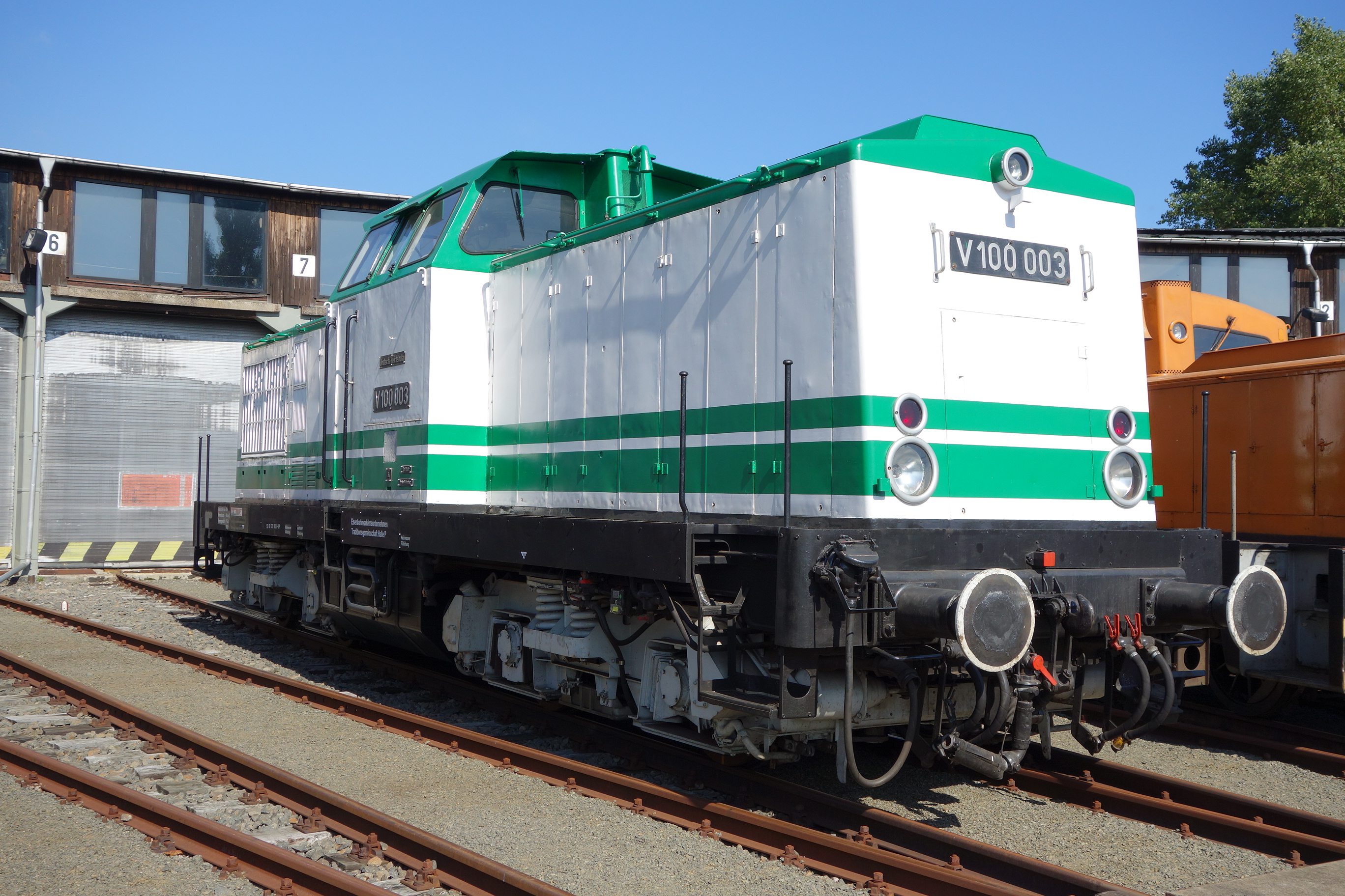 Bahnbetriebswerk Lutherstadt Wittenberg, V100 003